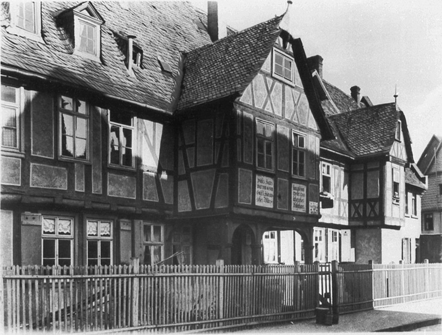 Alte Münze, ehemaliges gräfliches Münzhaus in der Erbsengasse 5, errichtet 1658. 1729-1768 Lutherisches Waisenhaus. Ab 1835 privat.